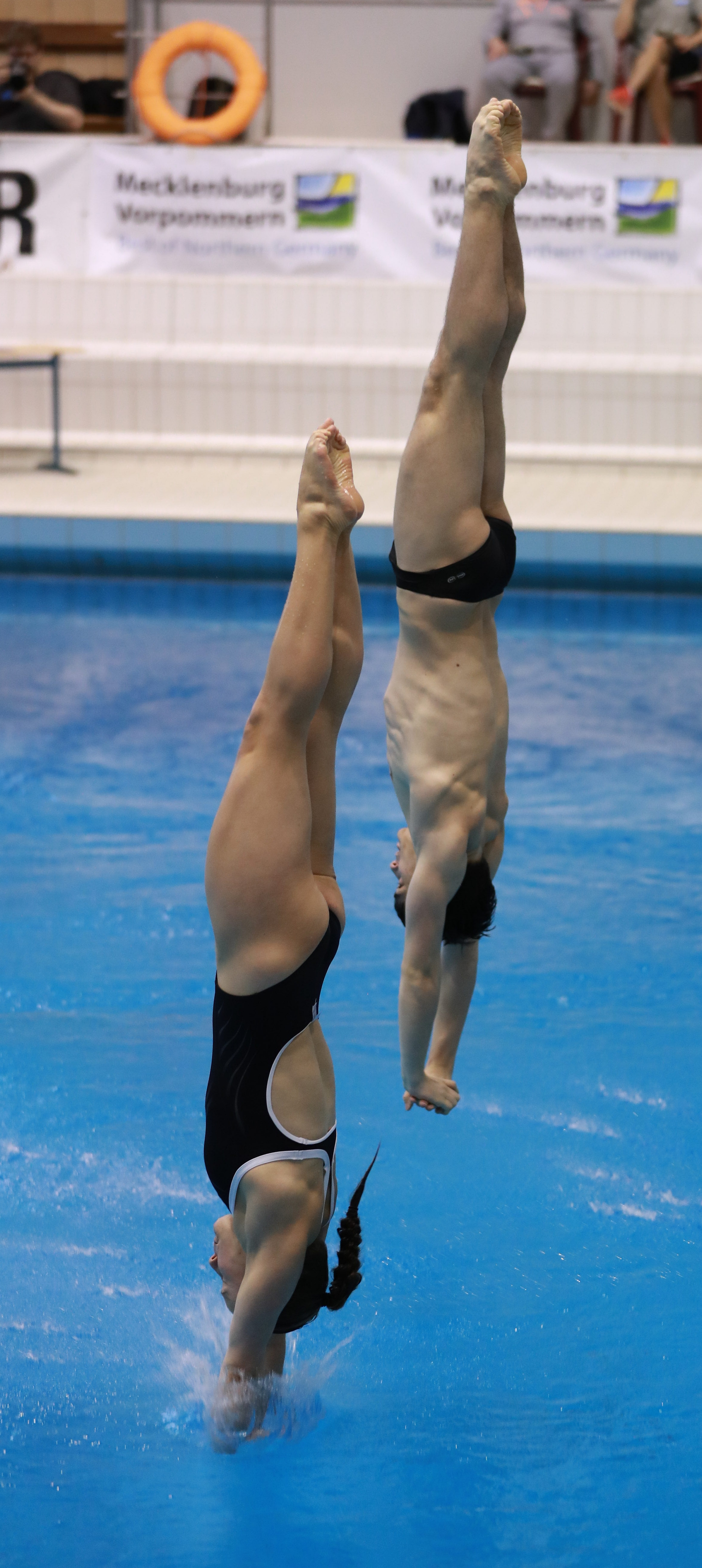 3m mixed Synchron Finale Sprung 1 bei den Internationalen Deutschen Hallenmeisterschaften im Wasserspringen Offene Klassen und Junioren. Abgebildet: Tina Punzel. Lou Massenberg.